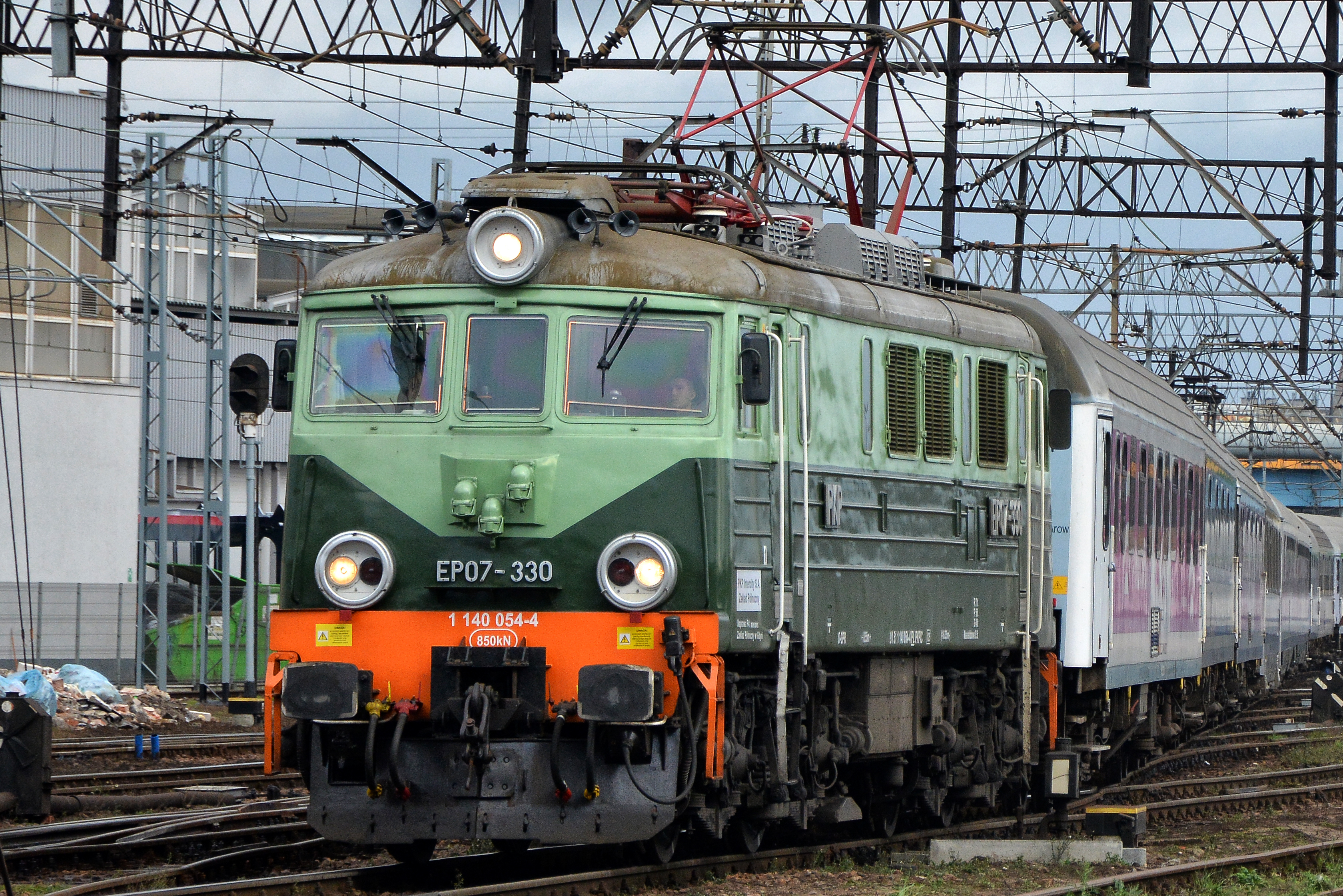 Bydgoszcz Główna, EP07-330